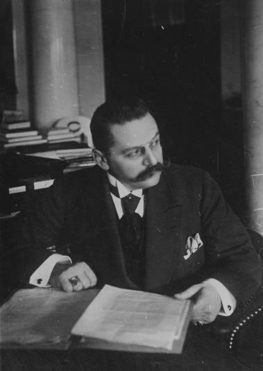 Министр внутренних дел Н.А.Маклаков в кабинете за рабочим столом.